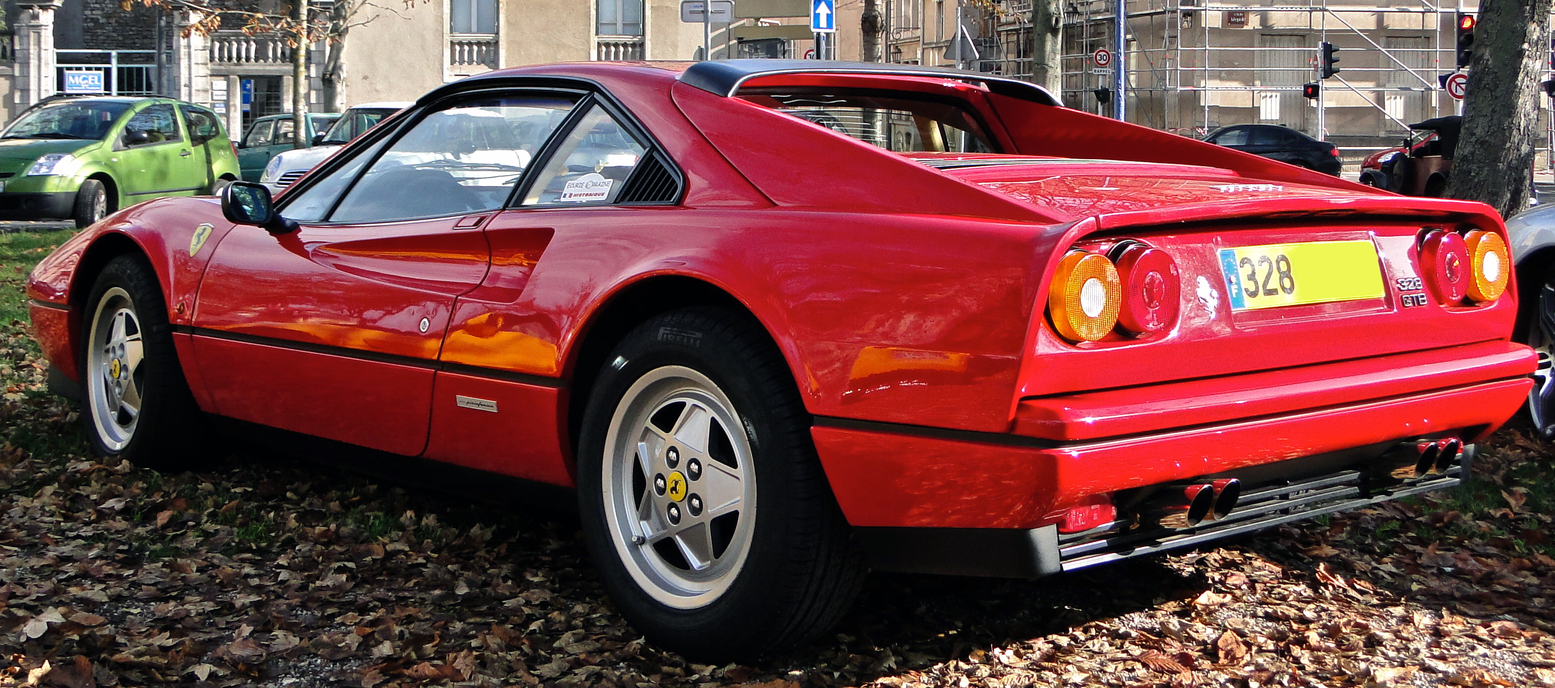 Ferrari 328 GTB